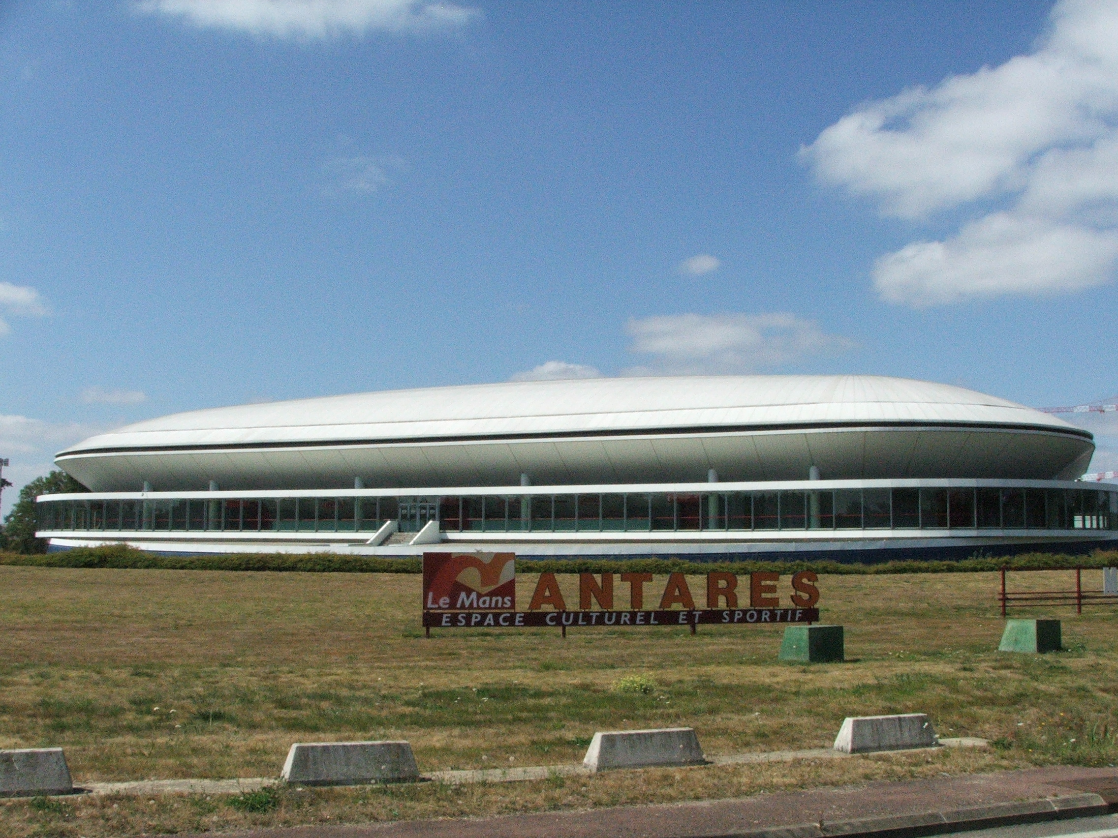 La salle de spectacle d'Antarès au Mans, antre du MSB pouvant accueillir jusqu'à 9000 spectateurs.